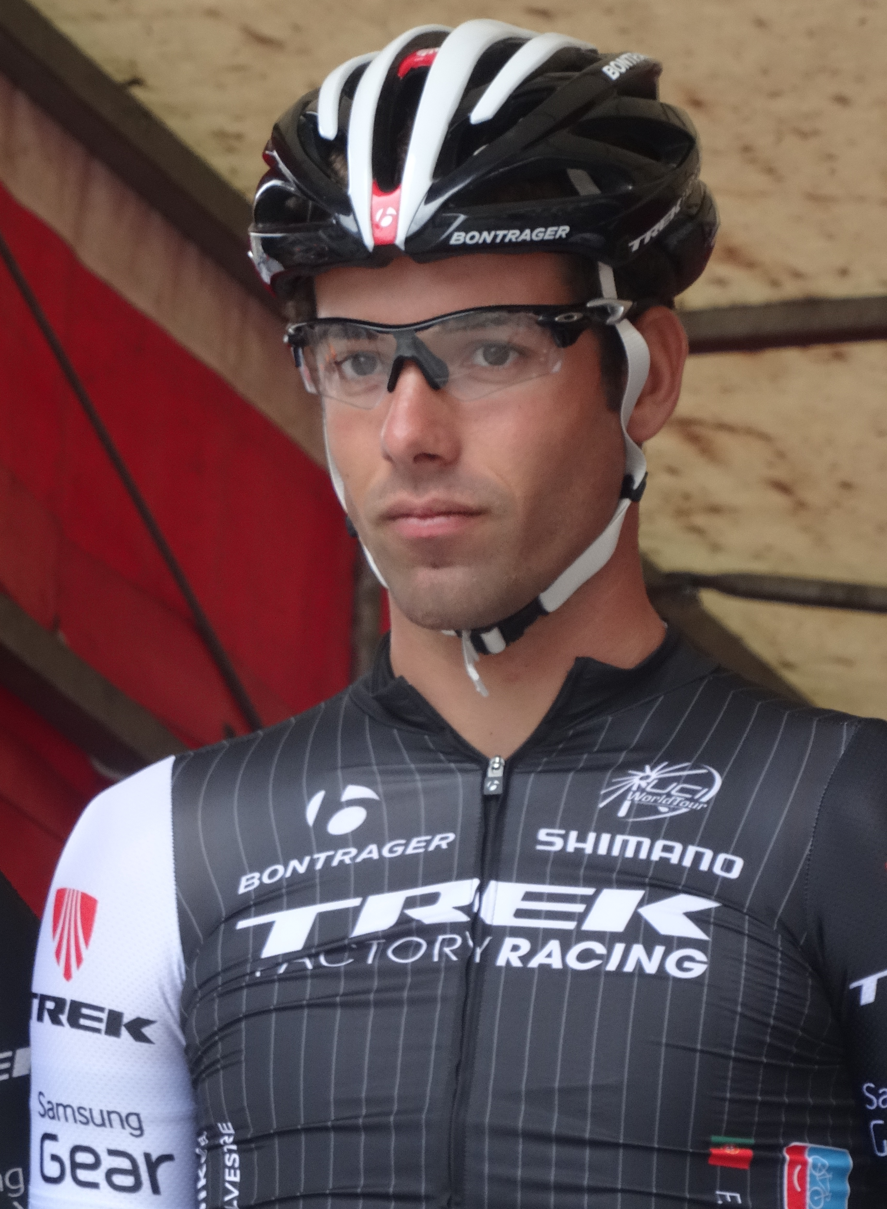 Reportage photographique réalisé le dimanche 14 septembre à l'occasion du départ et de l'arrivée du Grand Prix Jef Scherens 2014 à Louvain, Belgique.